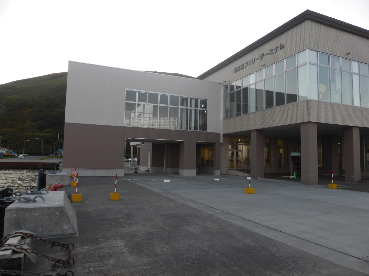 香深港フェリーターミナルのボーディングブリッジ